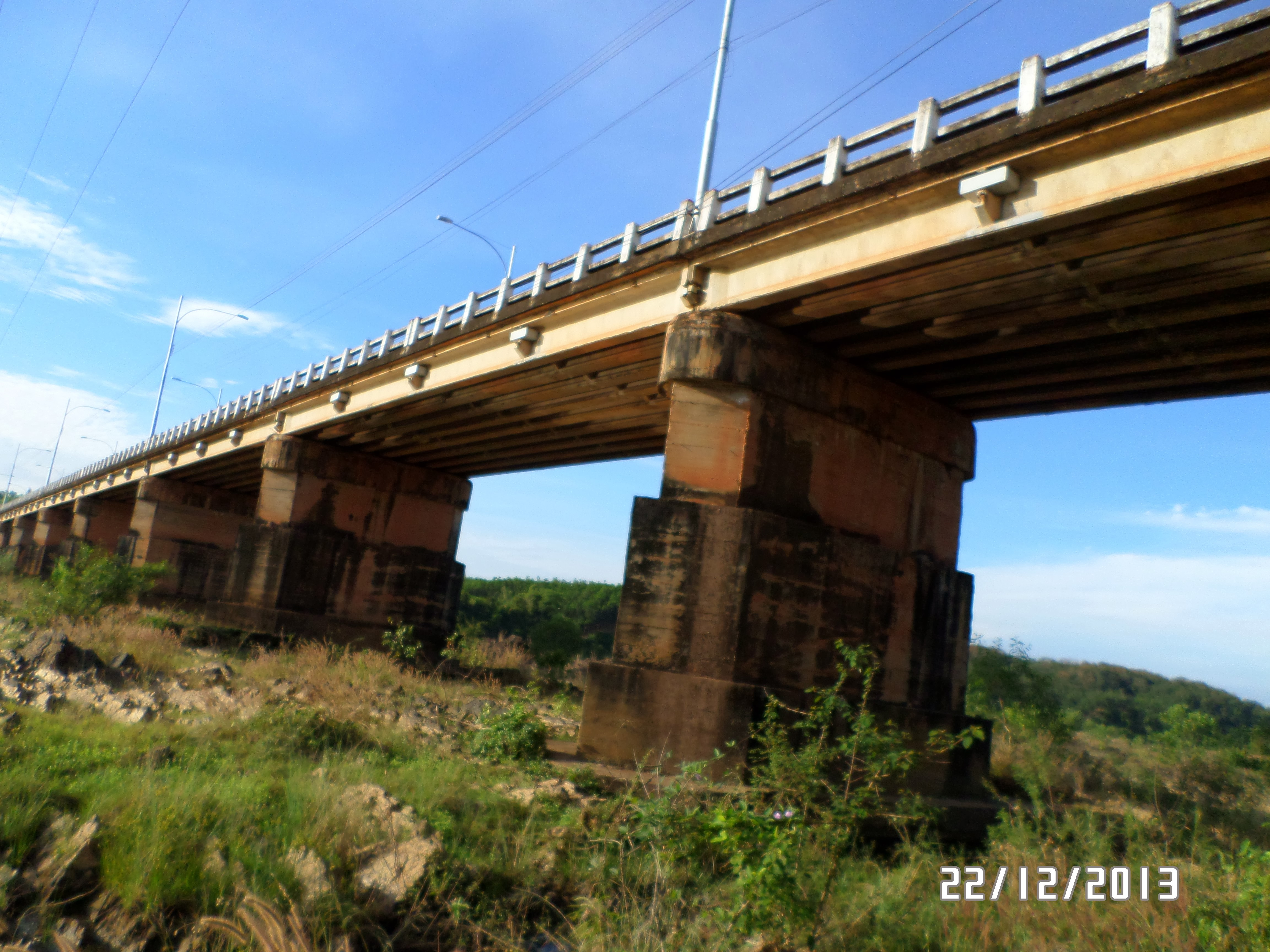 chân cầu đồng nai